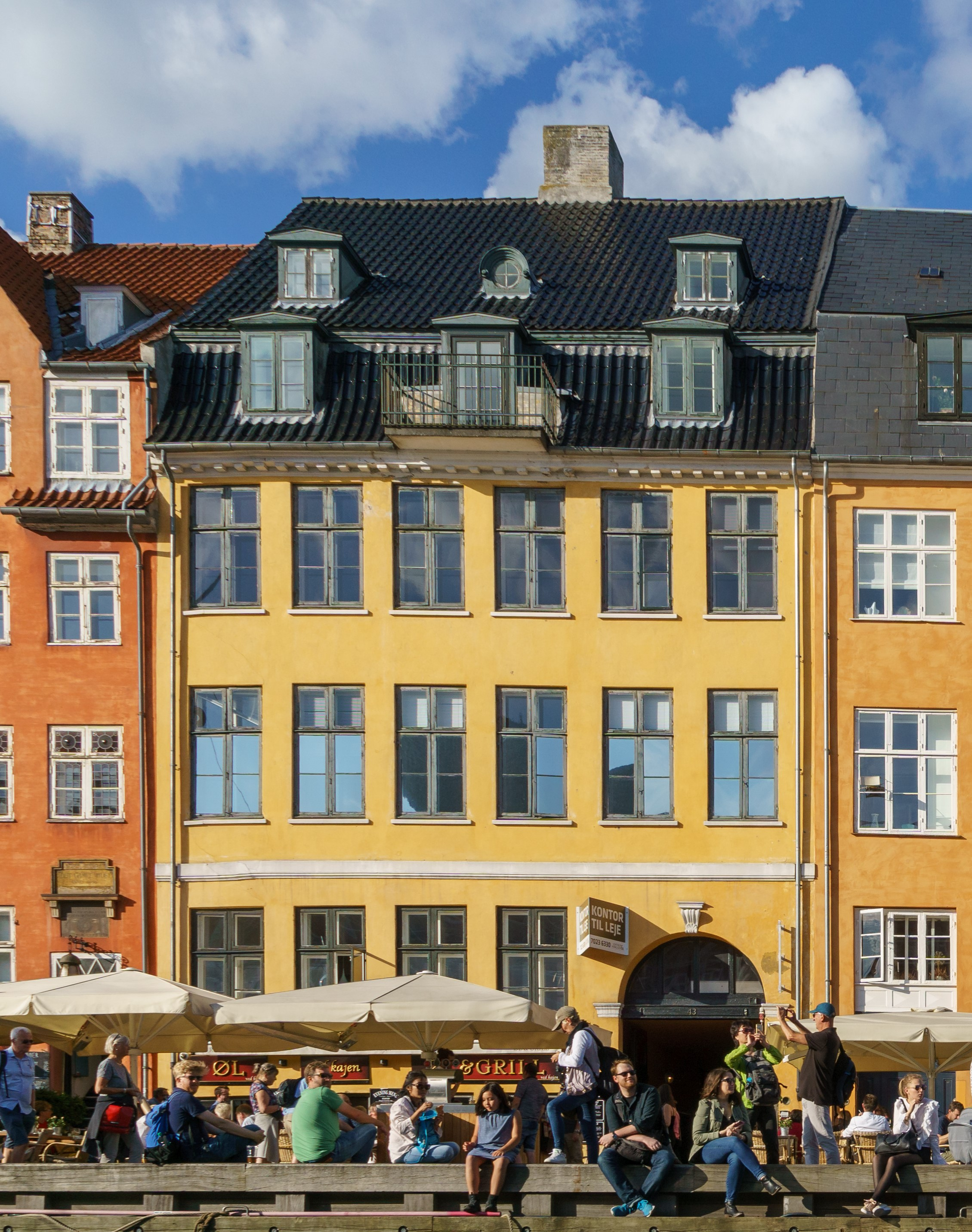 Nyhavn 43, Copenhagen